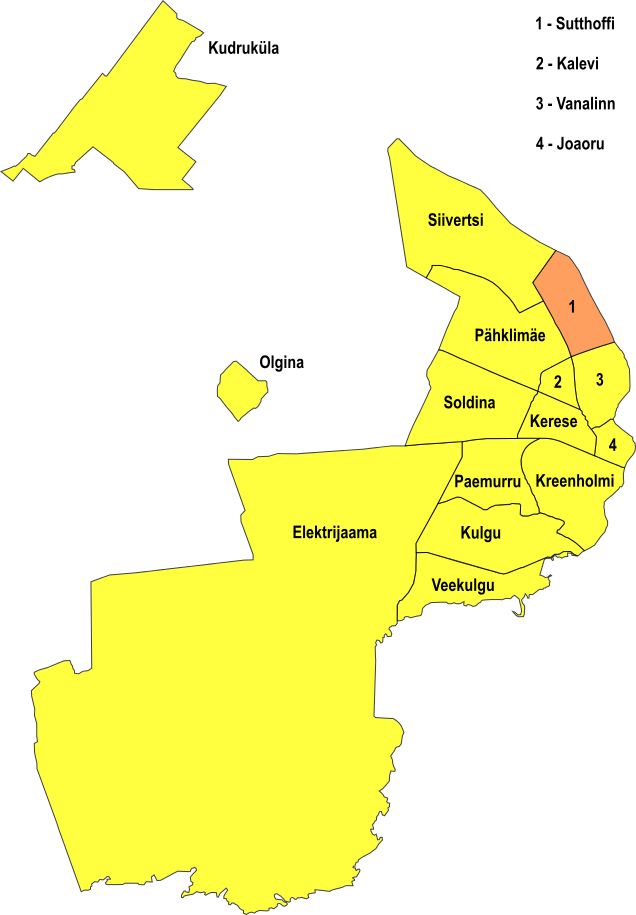 Sutthoffi linnaosa (Narva)